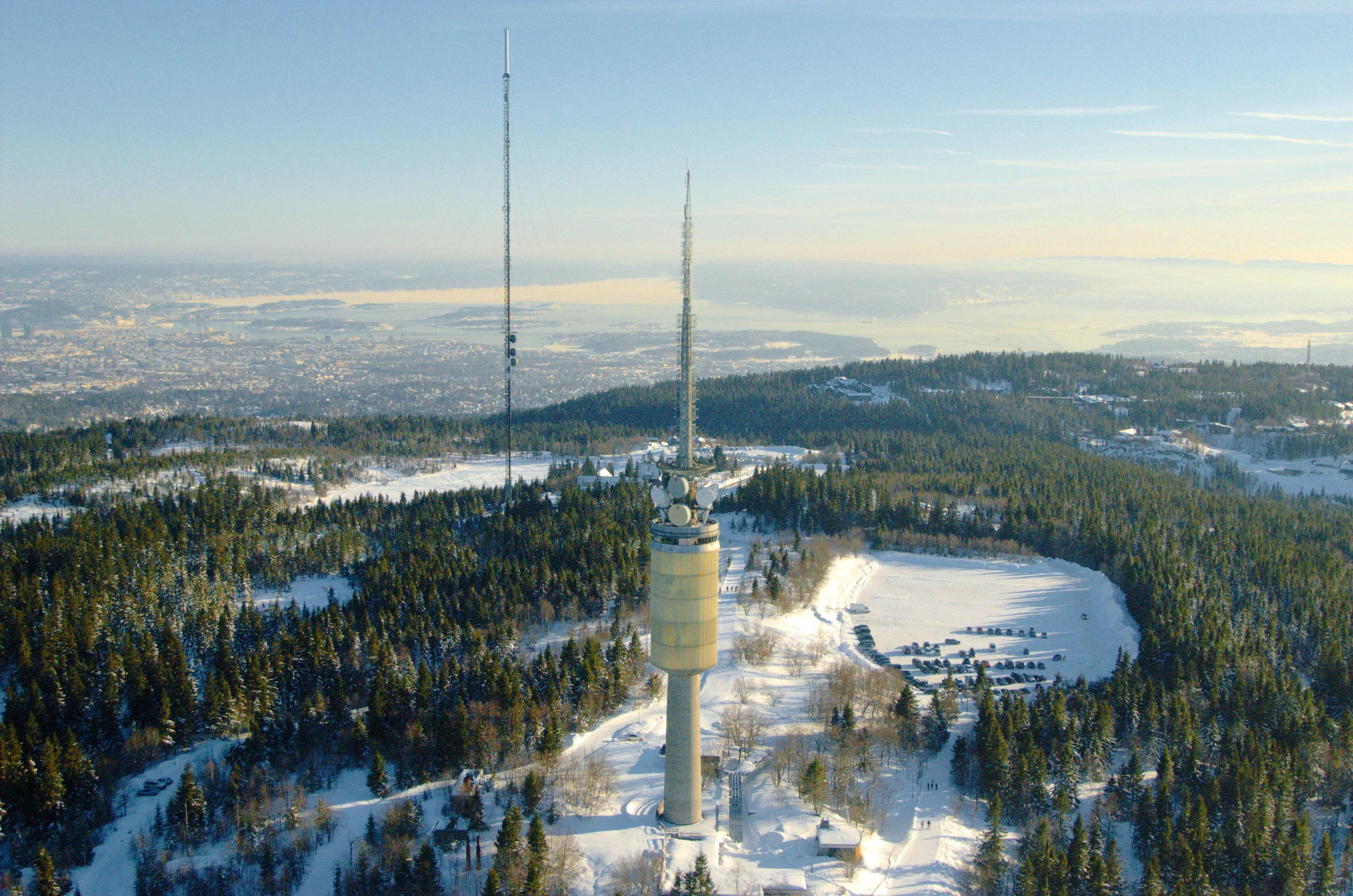 Tryvasshøgda, Oslo